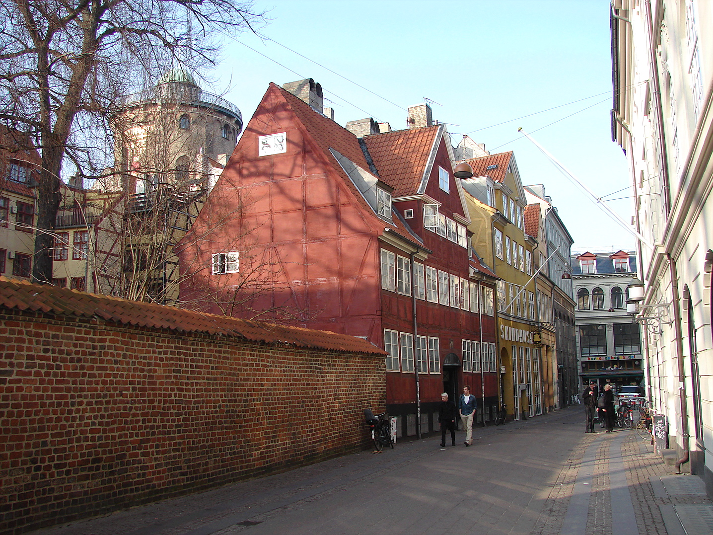 Skindergade, København